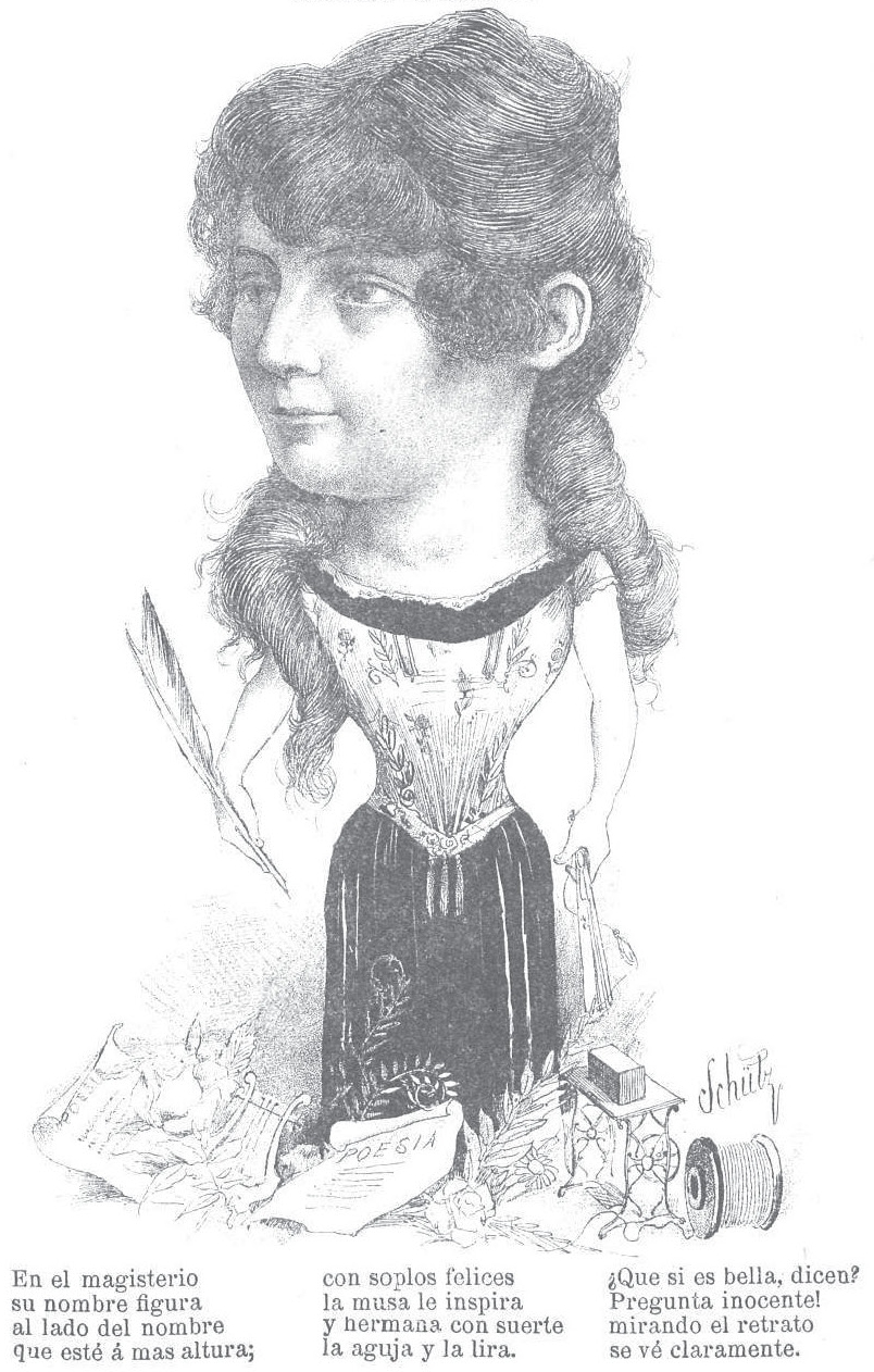 Caricatura de Adela Castell, aparecida en la portada de la publicación uruguaya Caras y Caretas, editada entre 1890 y 1897.